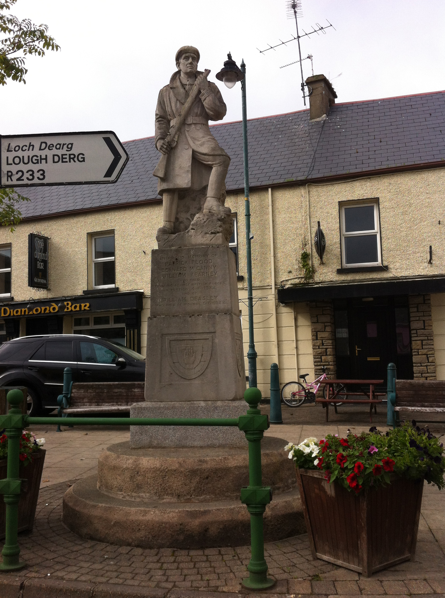 IRA memorial, Pettigo